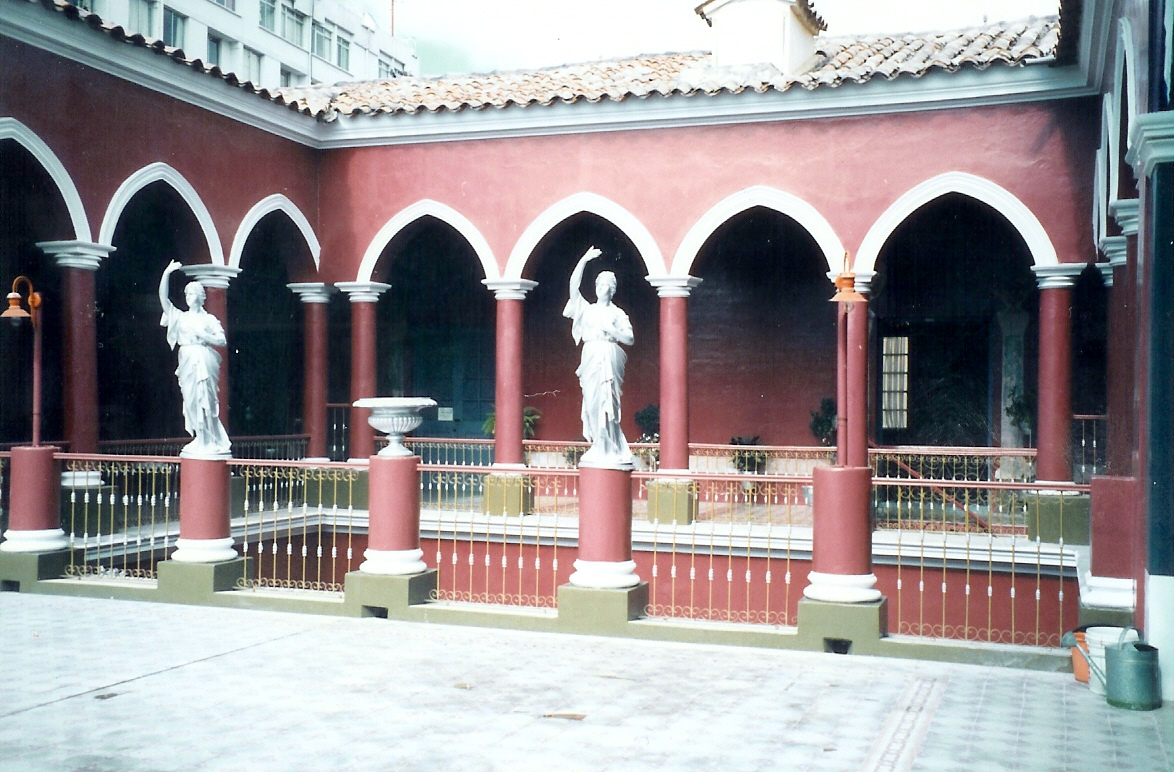 Interior de la Casa Dorada de tarija, Bolivia. Fotografía propia.